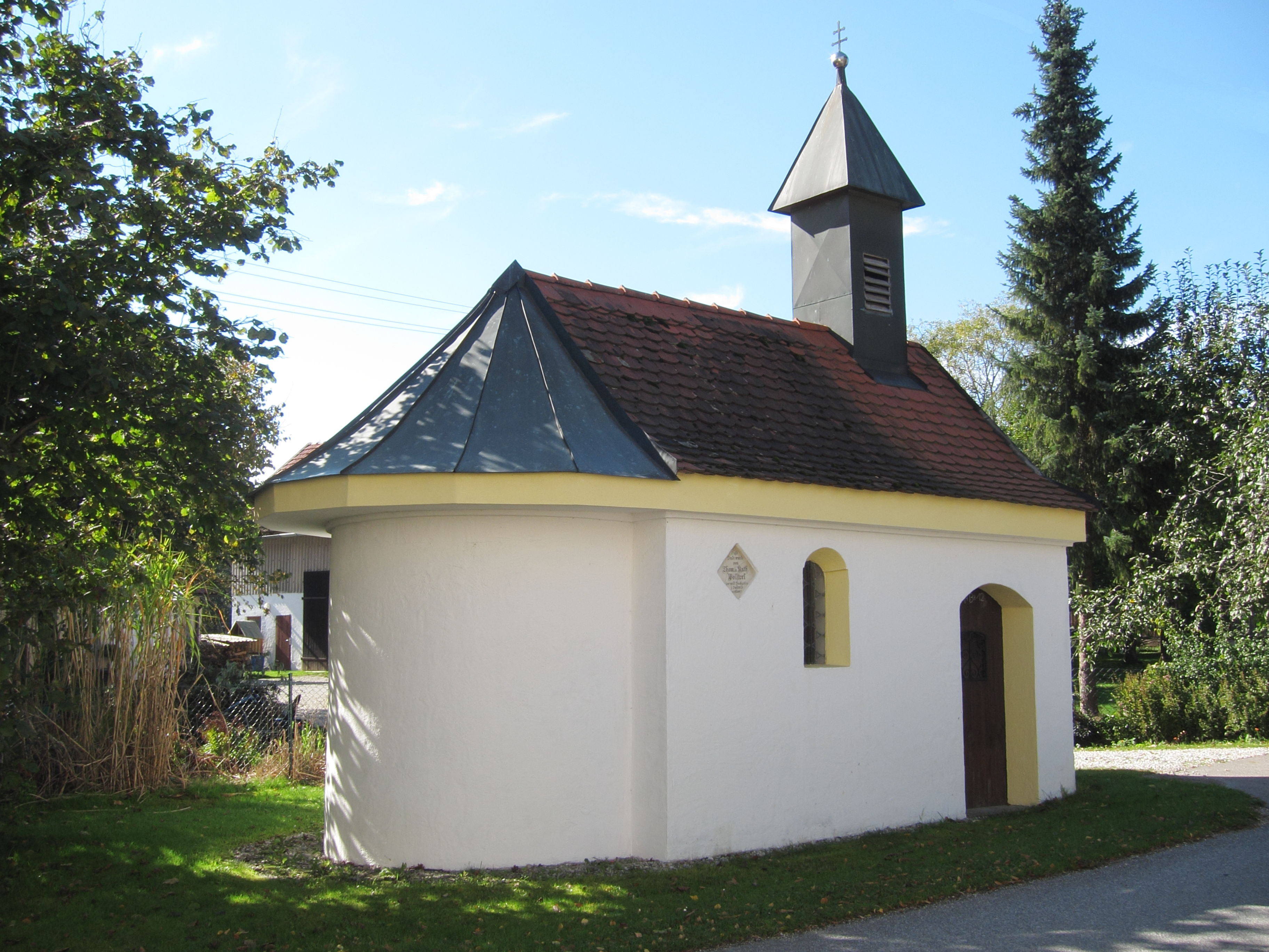 Unterstrogn; Ulrich-Kapelle mit weit auskragender Traufe, errichtet 1781, erneut geweiht 1868; mit Ausstattung.